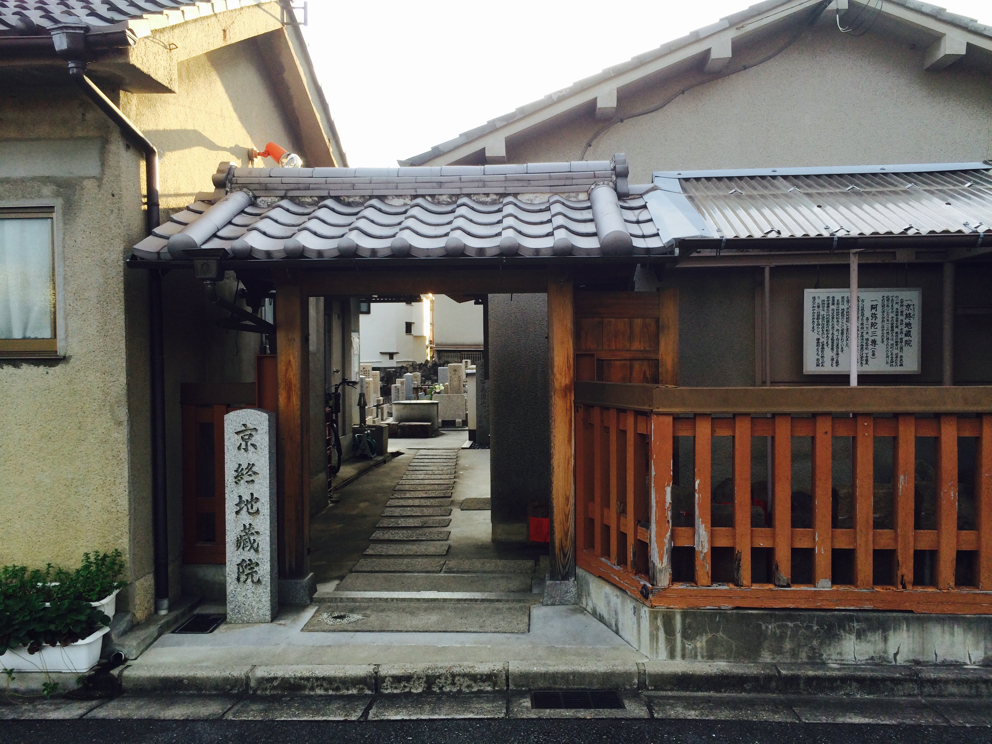 奈良市京終地蔵尊